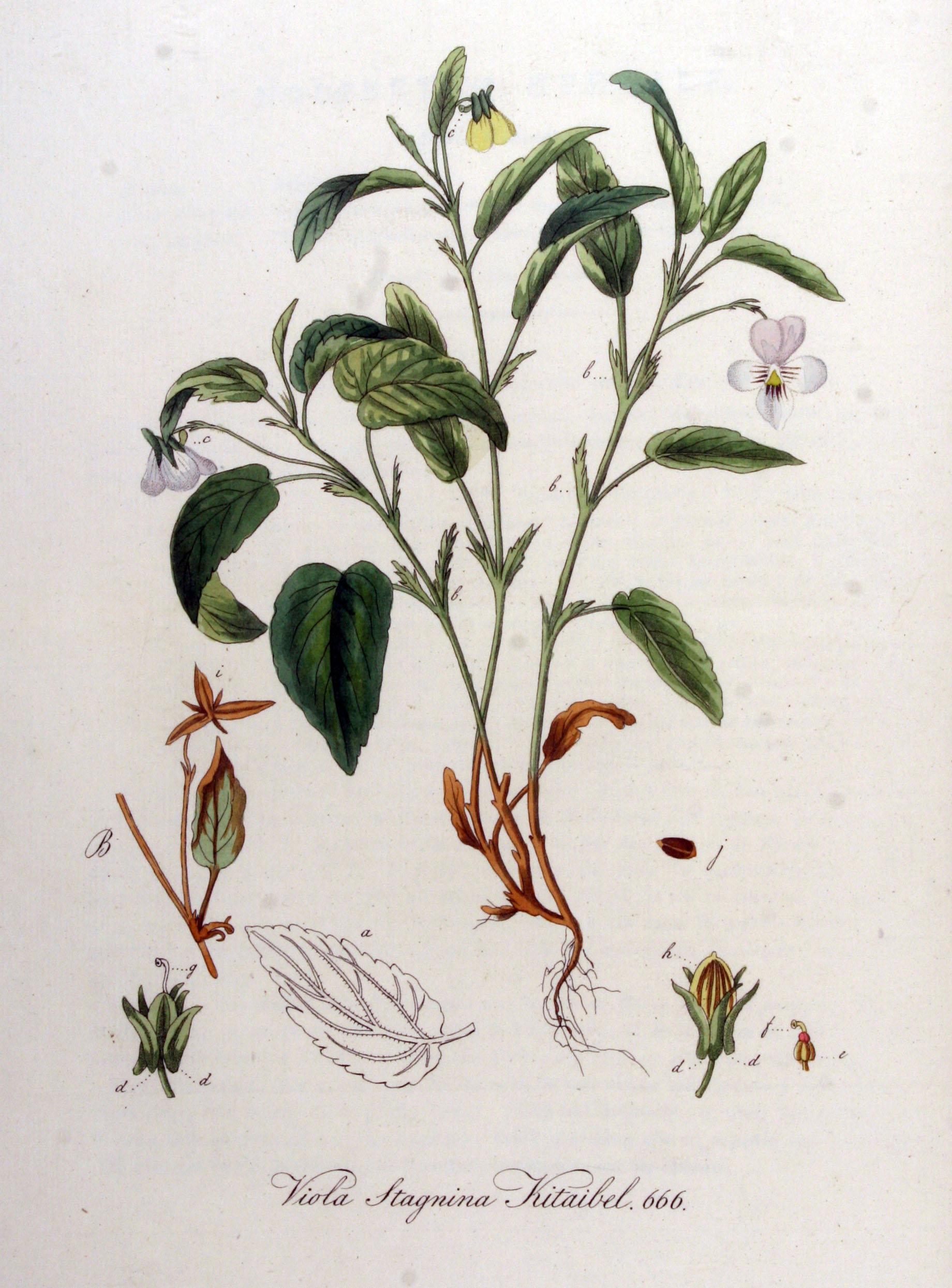 Viola stagnina Kit (Syn. Viola persicifolia Schreb.)